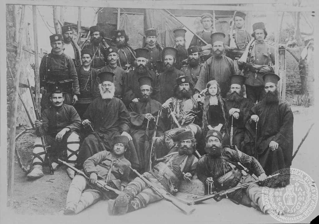 Четата на Тане Николов.